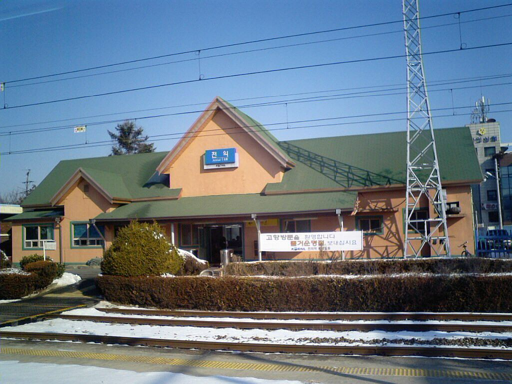 京釜線全義駅